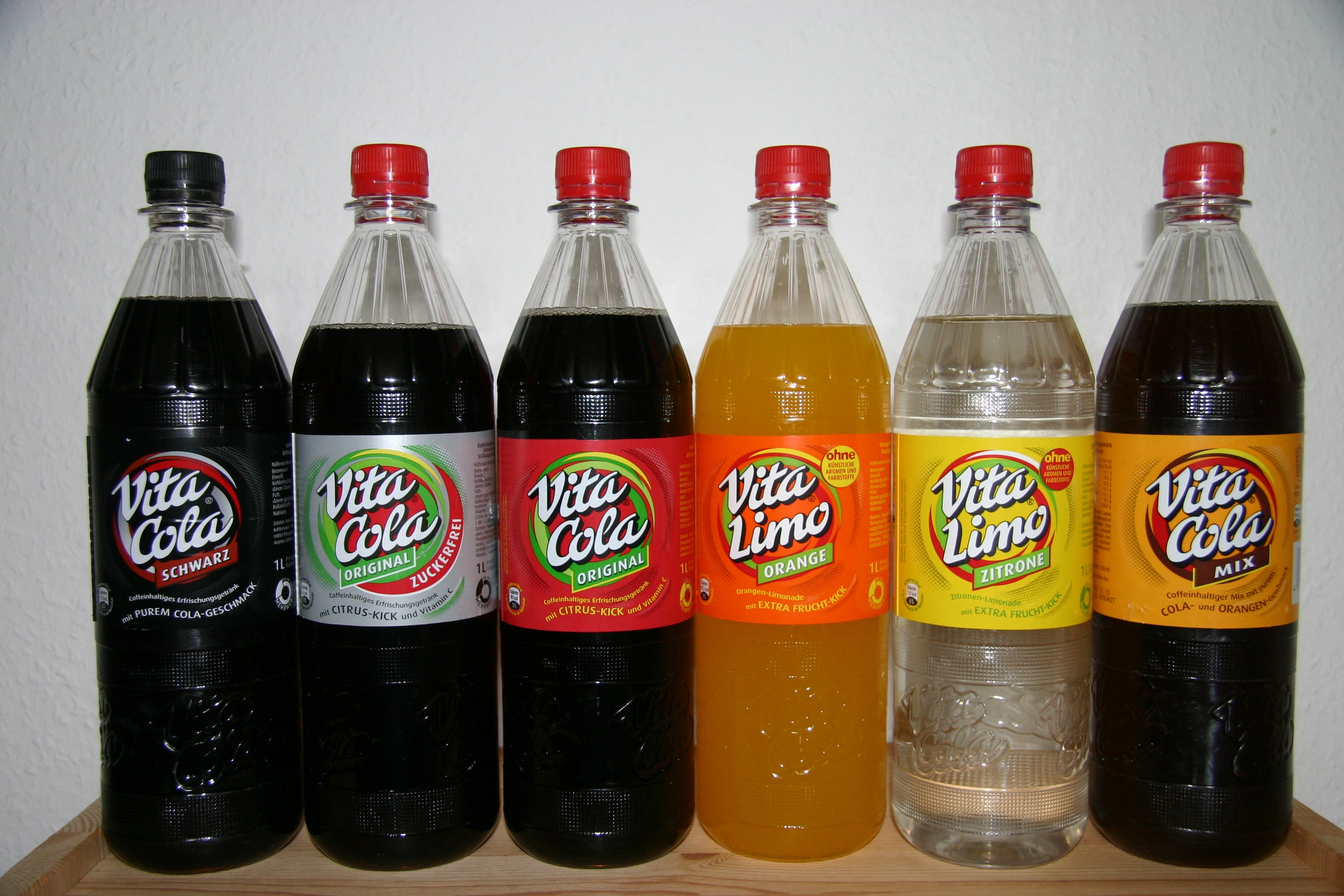 Alle Vita Cola Produkte im Juli 2010.